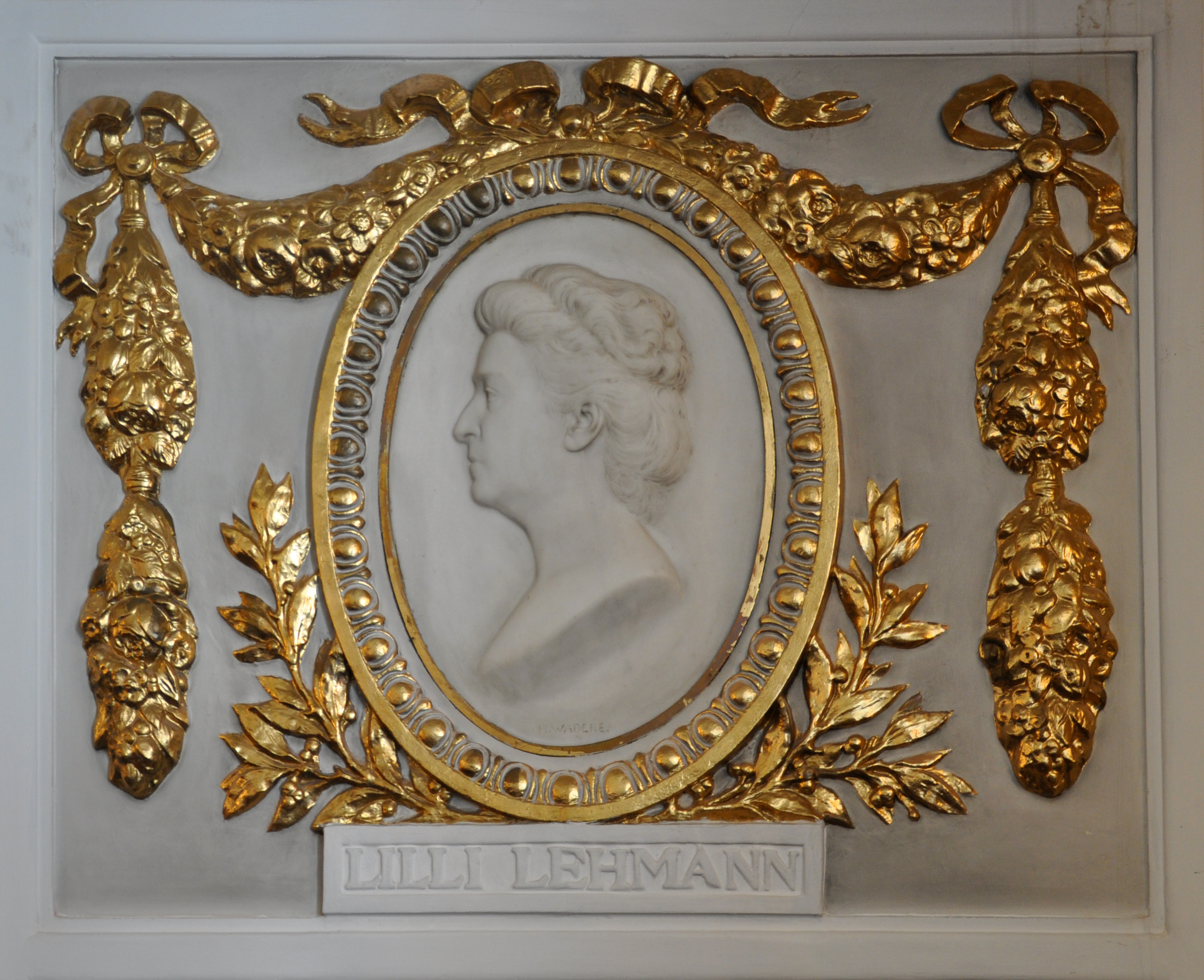 Salzburg, Mozarteum, Großer Saal, Denkmal Lilli Lehmann